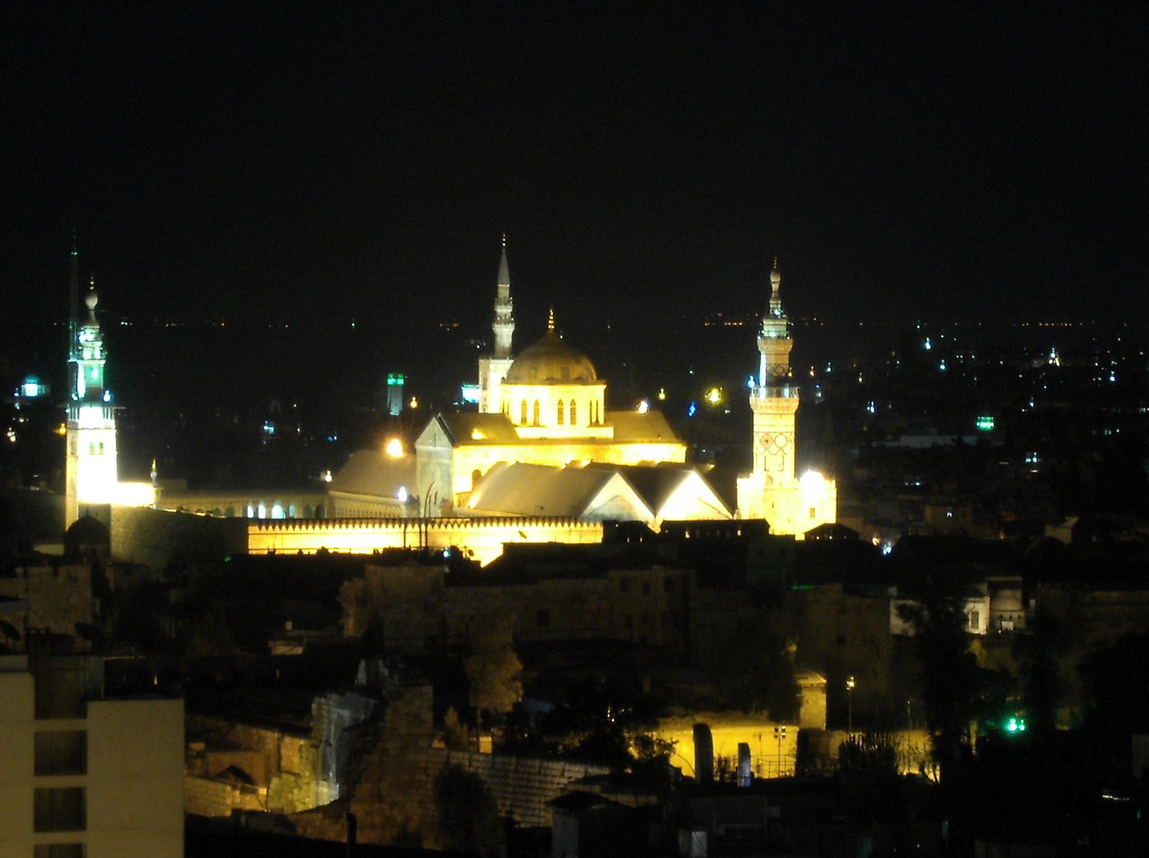 منظر ليلي لجامع بني أمية